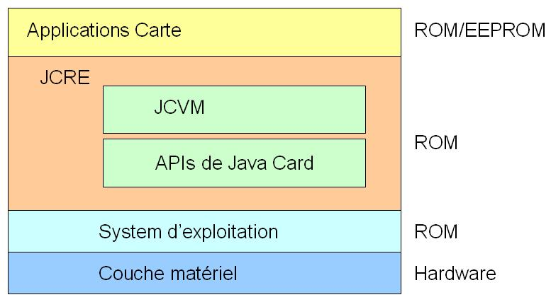 javacard